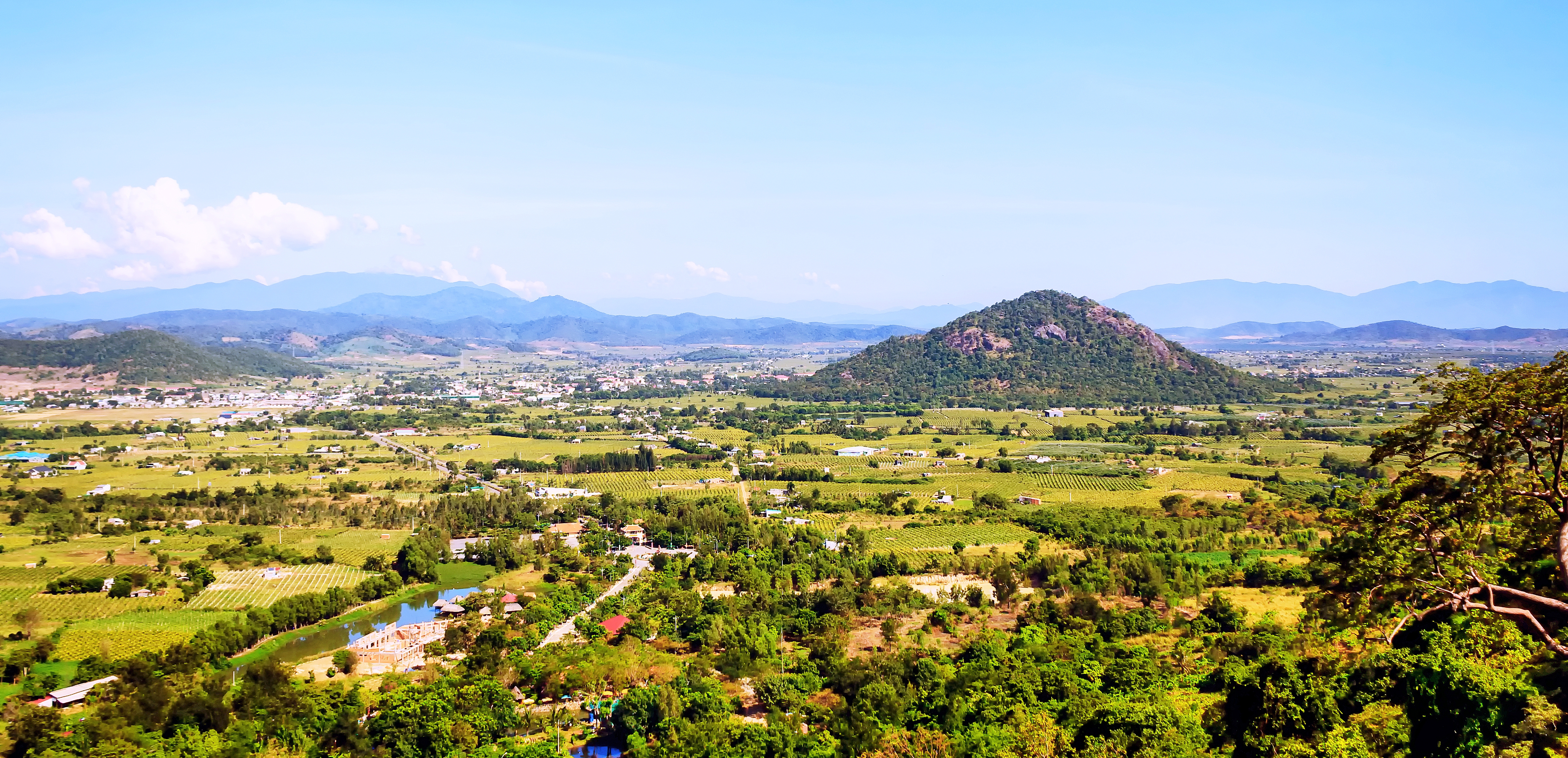 Phong cảnh ở huyện Hàm Thuận Nam, tỉnh Bình Thuận, Việt Nam (nhìn từ trên cao).